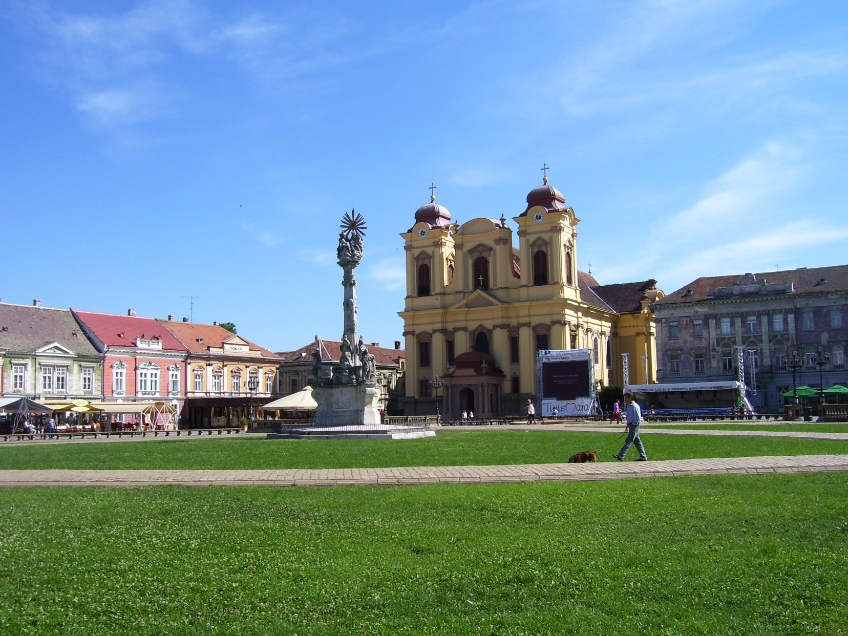 Timisoara (Romania), Plata Unirii